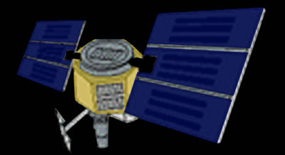 SAGE satellite